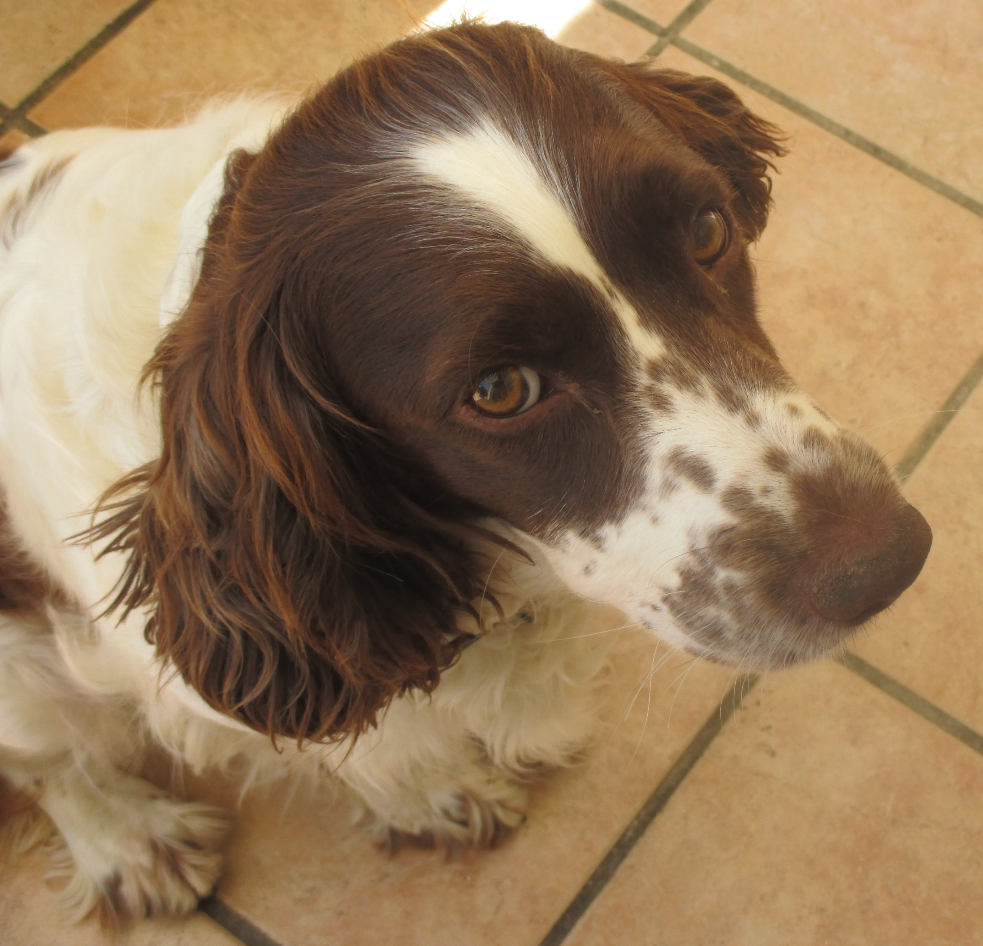 Épagneul anglais vivant en France.